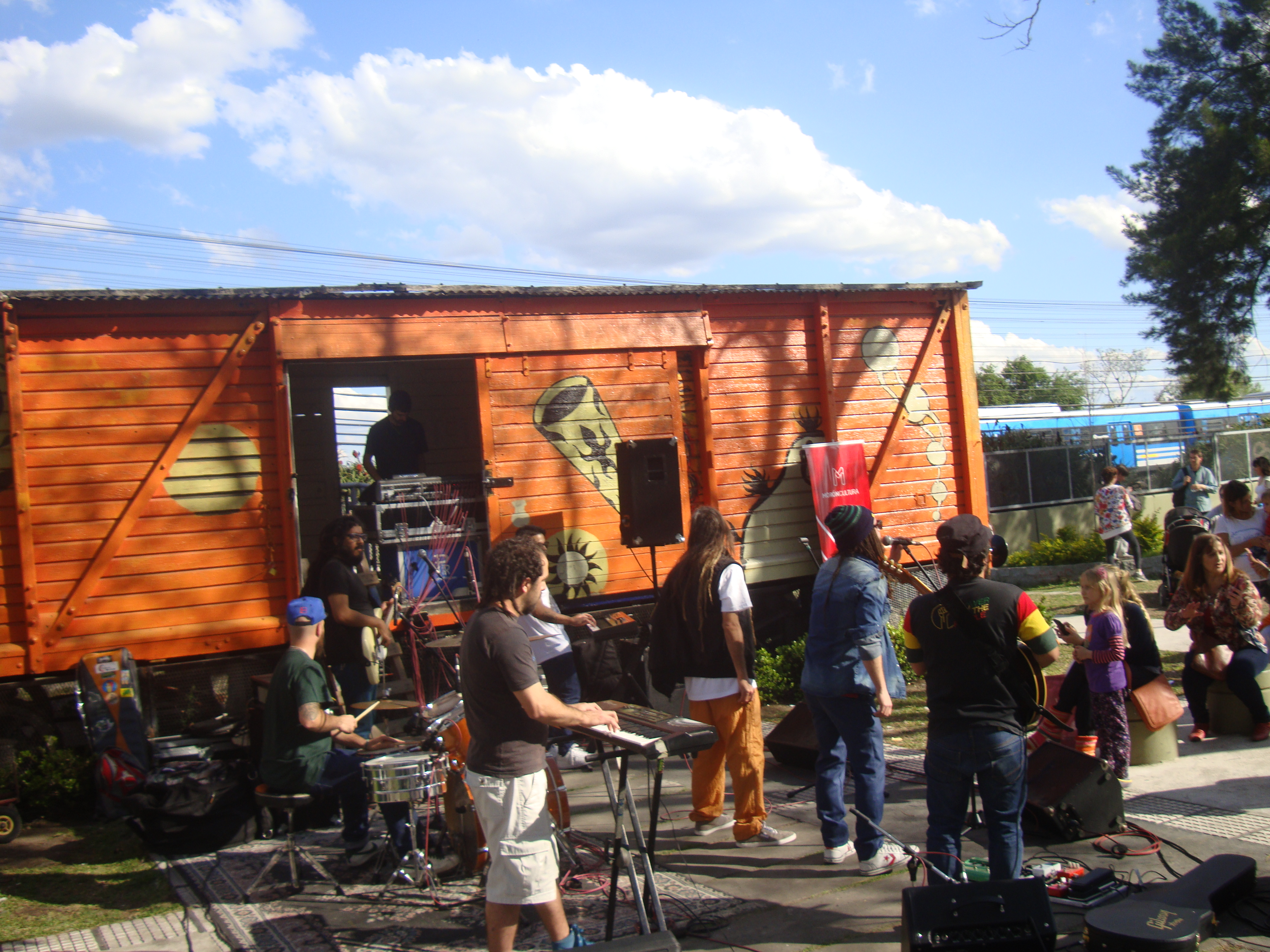 Foto de banda tocando en plaza del Vagón Castelar.